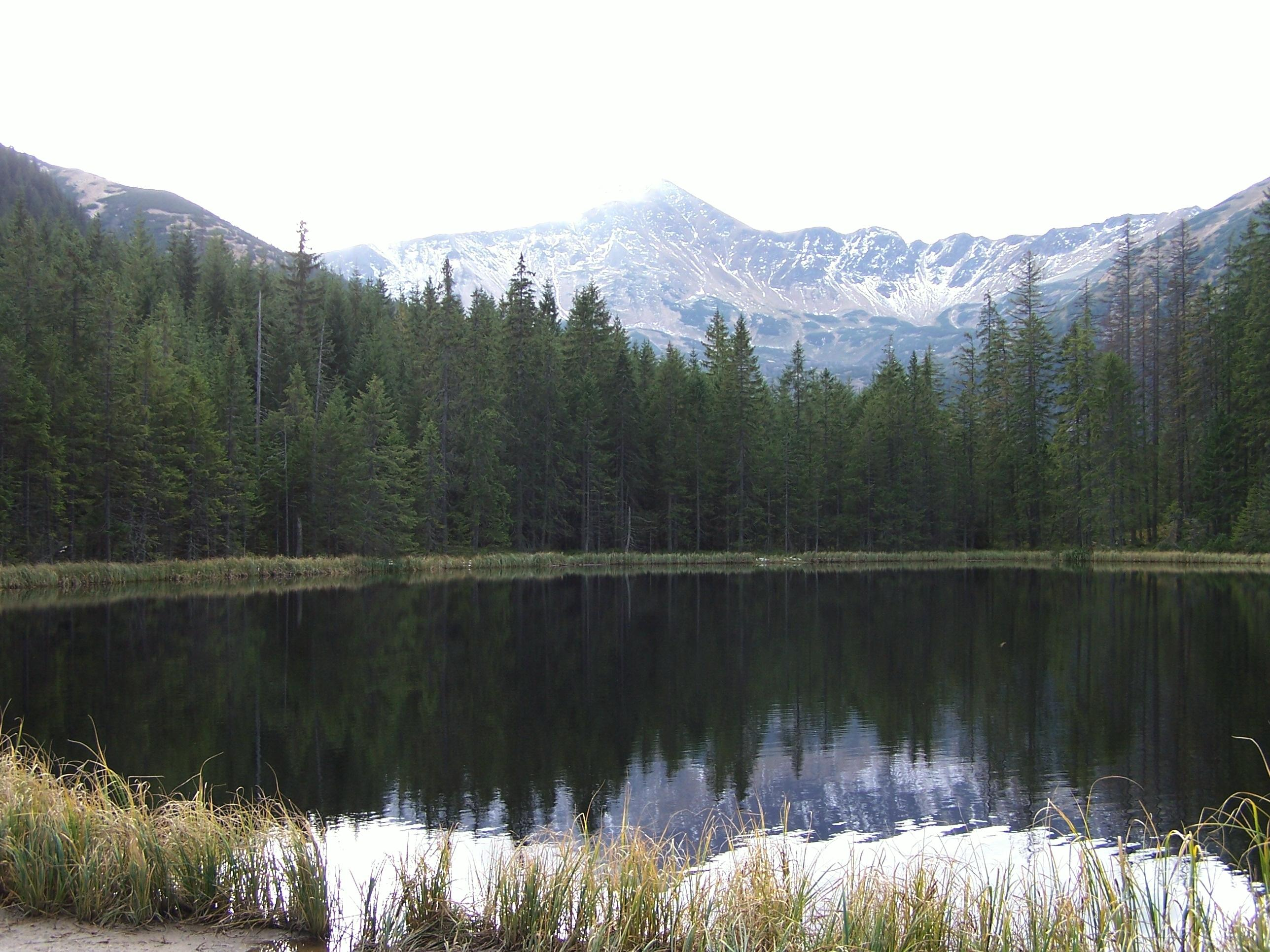 Smreczyński Staw (Tatra Mountains))